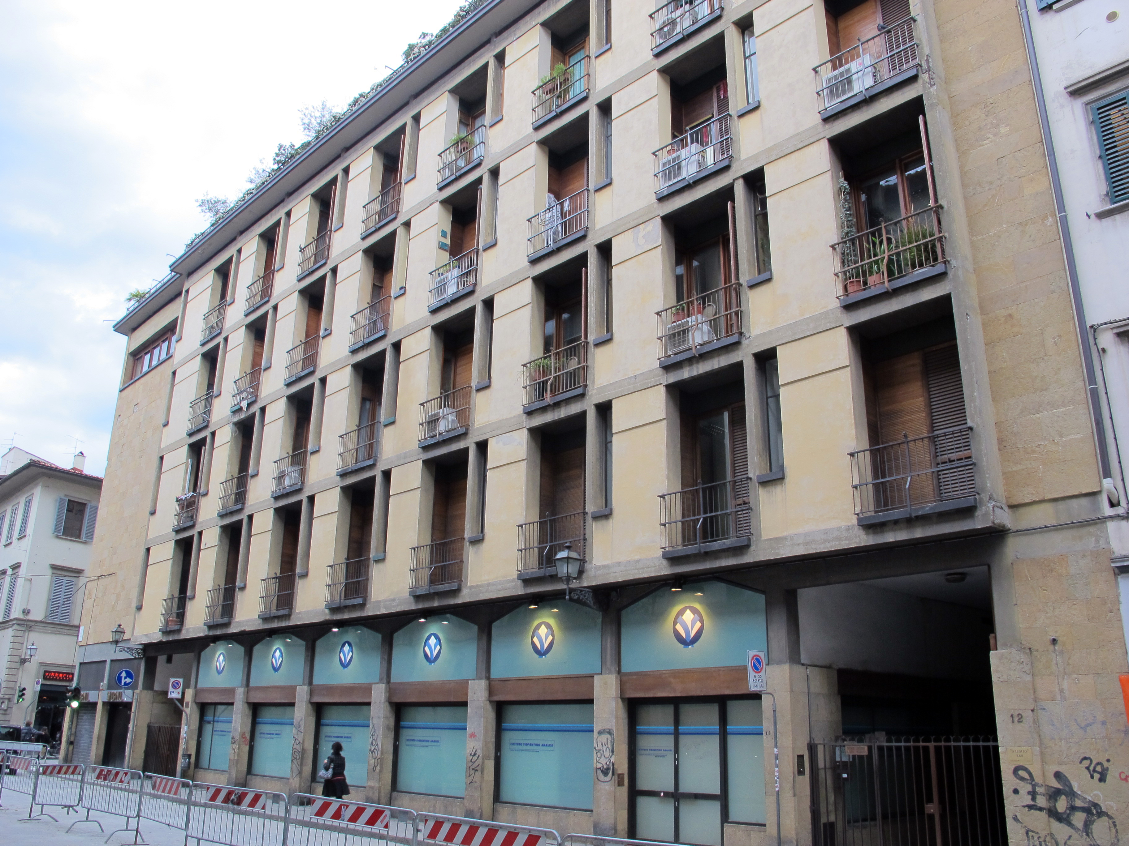 Via verdi, palazzone ex-ripa